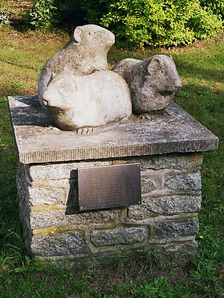 Riems, Meerschweinchendenkmal (FLI), Skulptur nach Prütz im Eingangsbereich der Riemser Arzneimittel AG. (fr) Riems, monument aux cochons d'Inde (FLI), sculpture d'après Prütz dans la zone d'entrée de Riemser Arzneimittel AG.